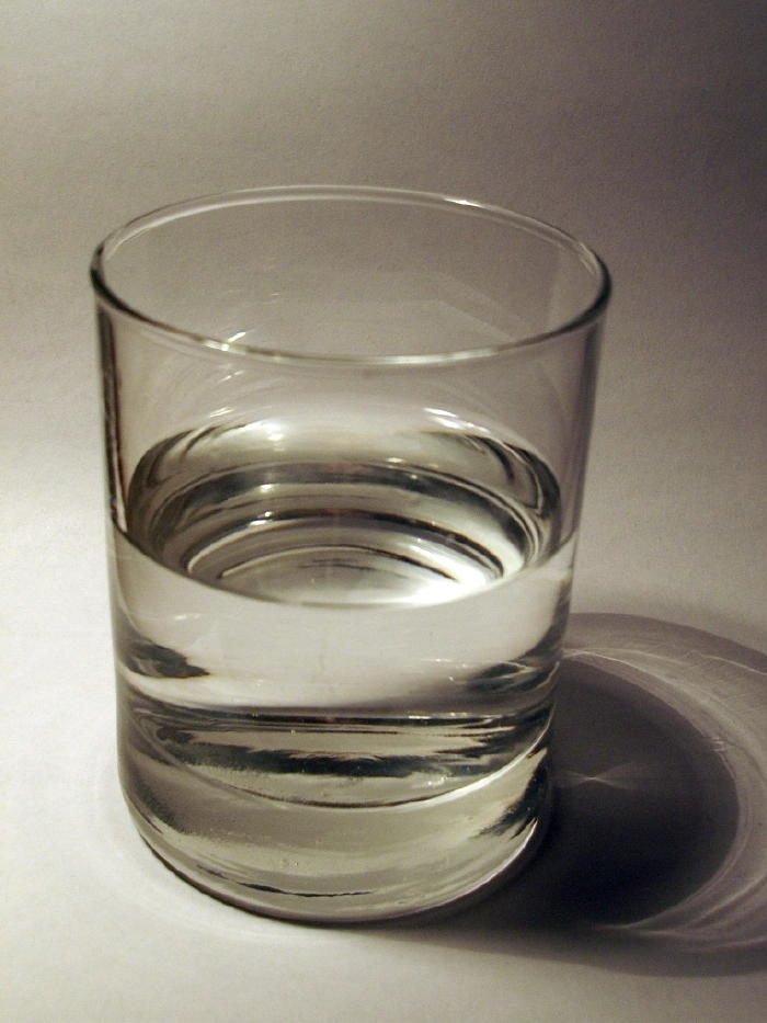 Wasserglas